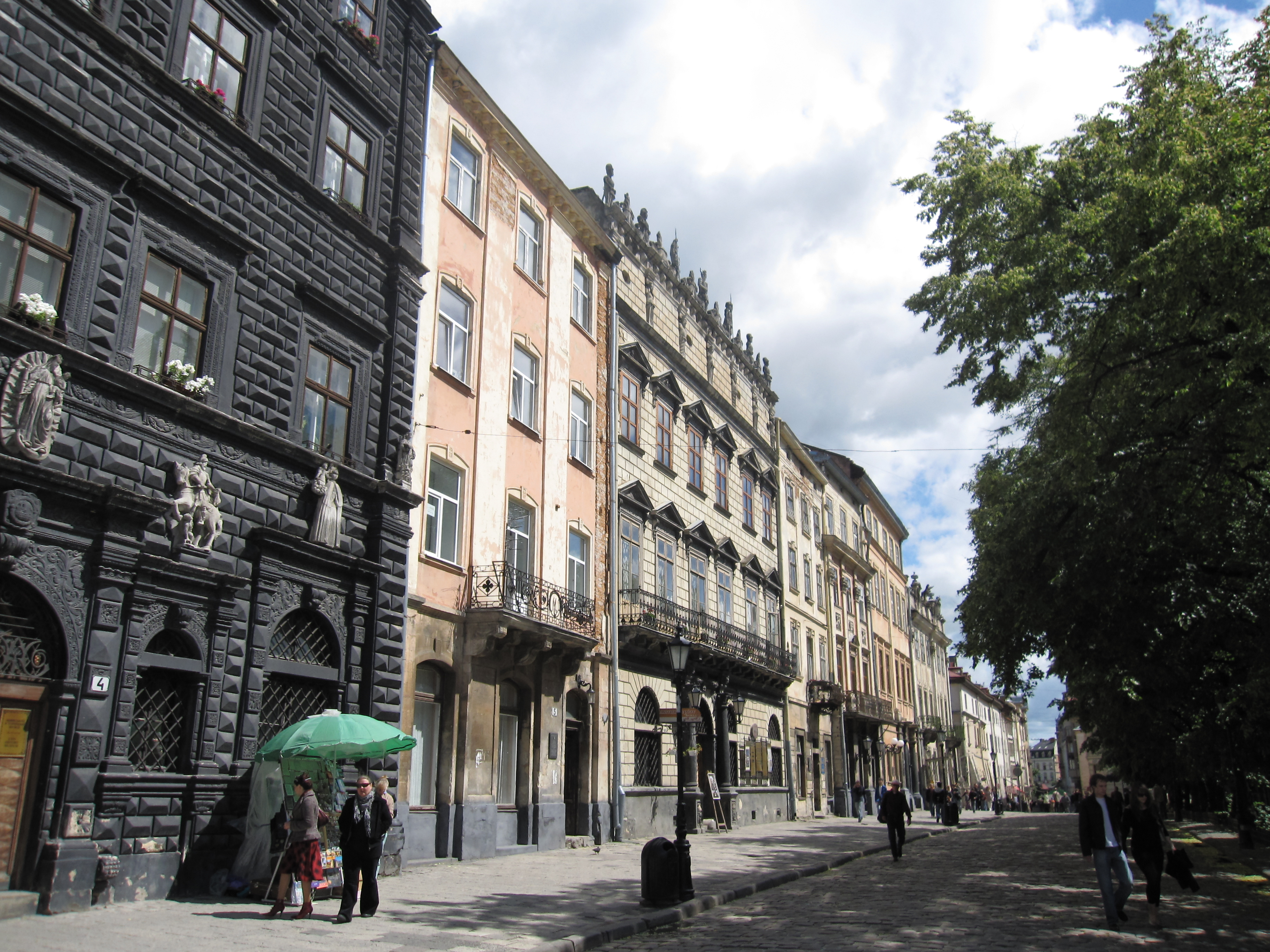 Rynek of Lwow